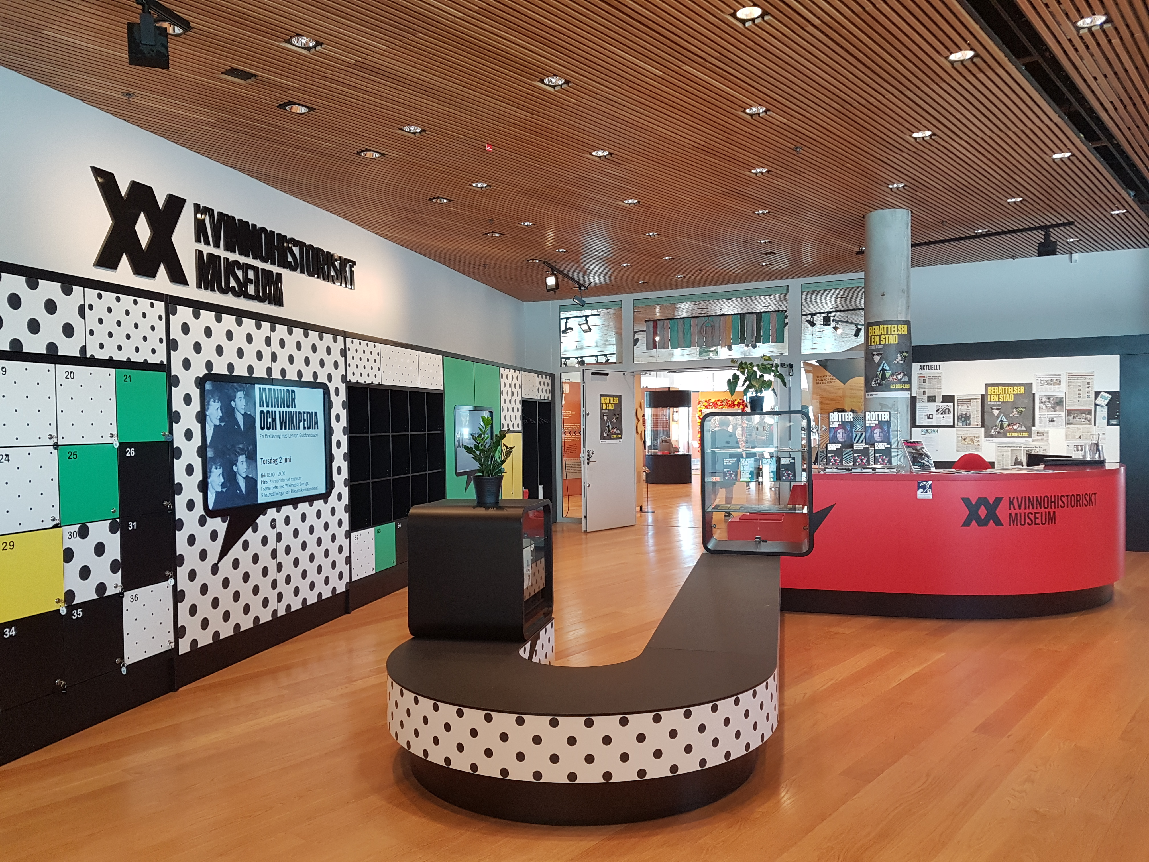 Entrén på Kvinnohistoriskt museum i Umeå.